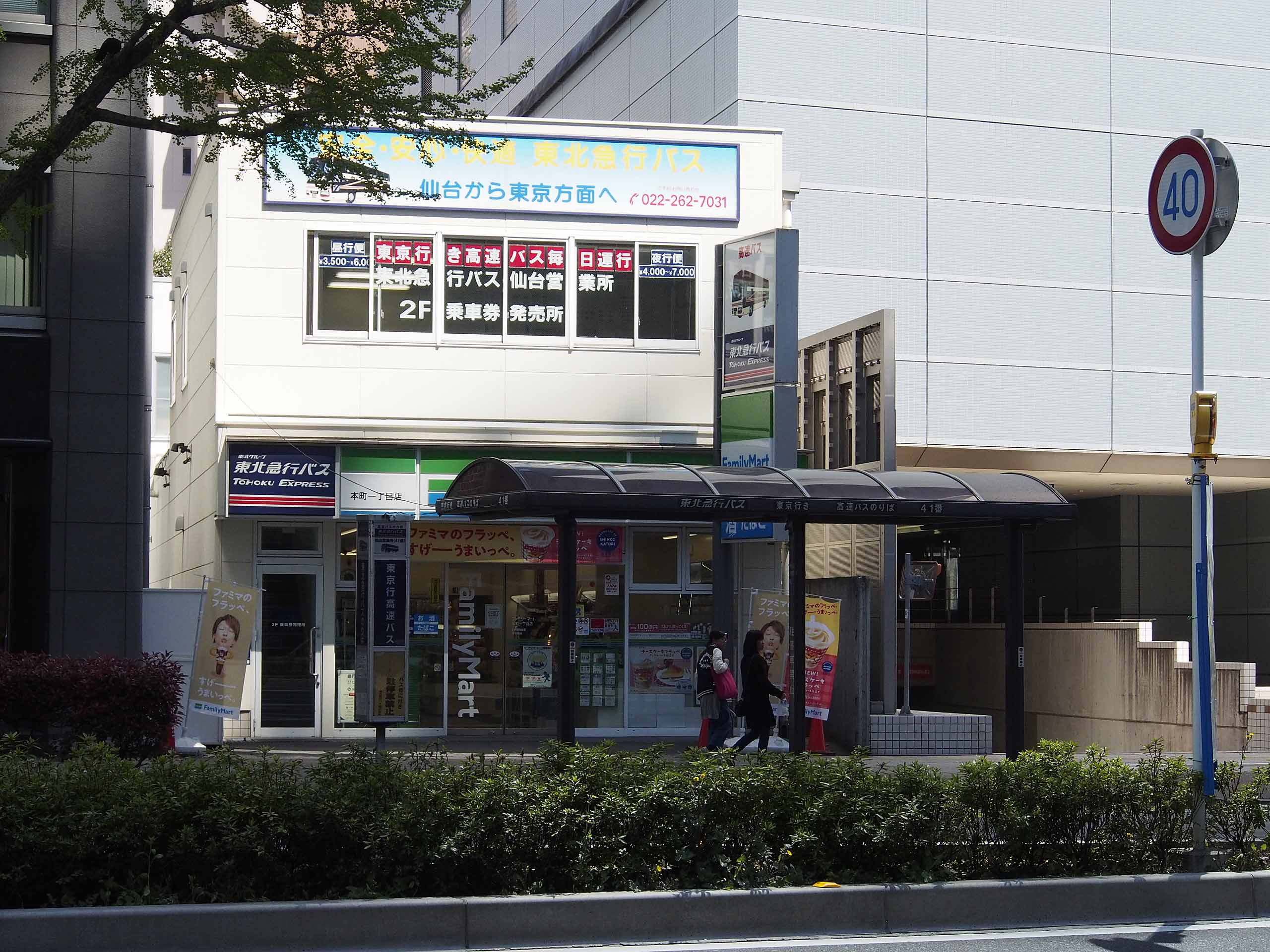 仙台駅西口付近の仙台市青葉区本町・広瀬通にある東北急行バス仙台営業所。東京 - 仙台間の高速バス「ニュースター」「ホリデースター」はここを始発・終着とする。宮城交通の宮交仙台高速バスターミナルとは広瀬通を挟んで向き合う。